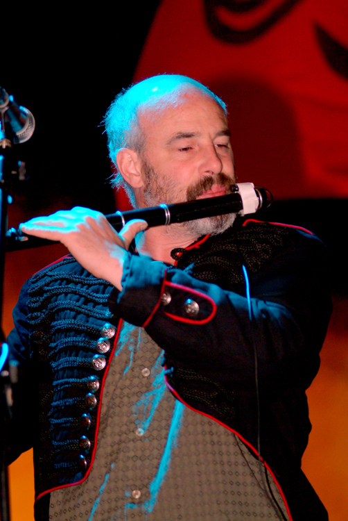 El músico Colm Ó Snodaigh, integrante de la banda Irlandesa KILA, durante el festival SonCelta en la población de Porto do Son, Galicia - España en julio del 2009